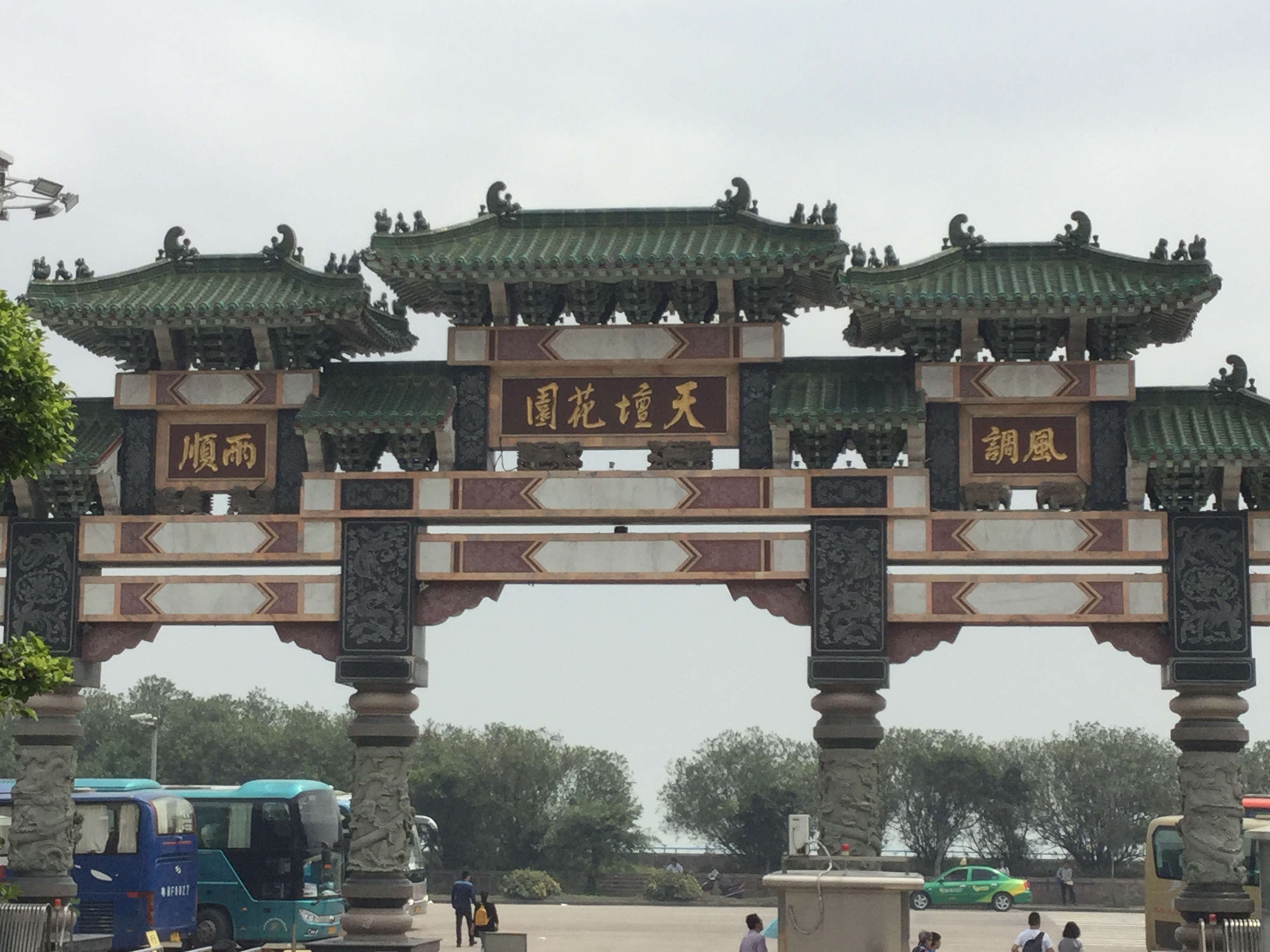 牌坊，汕头天坛花园